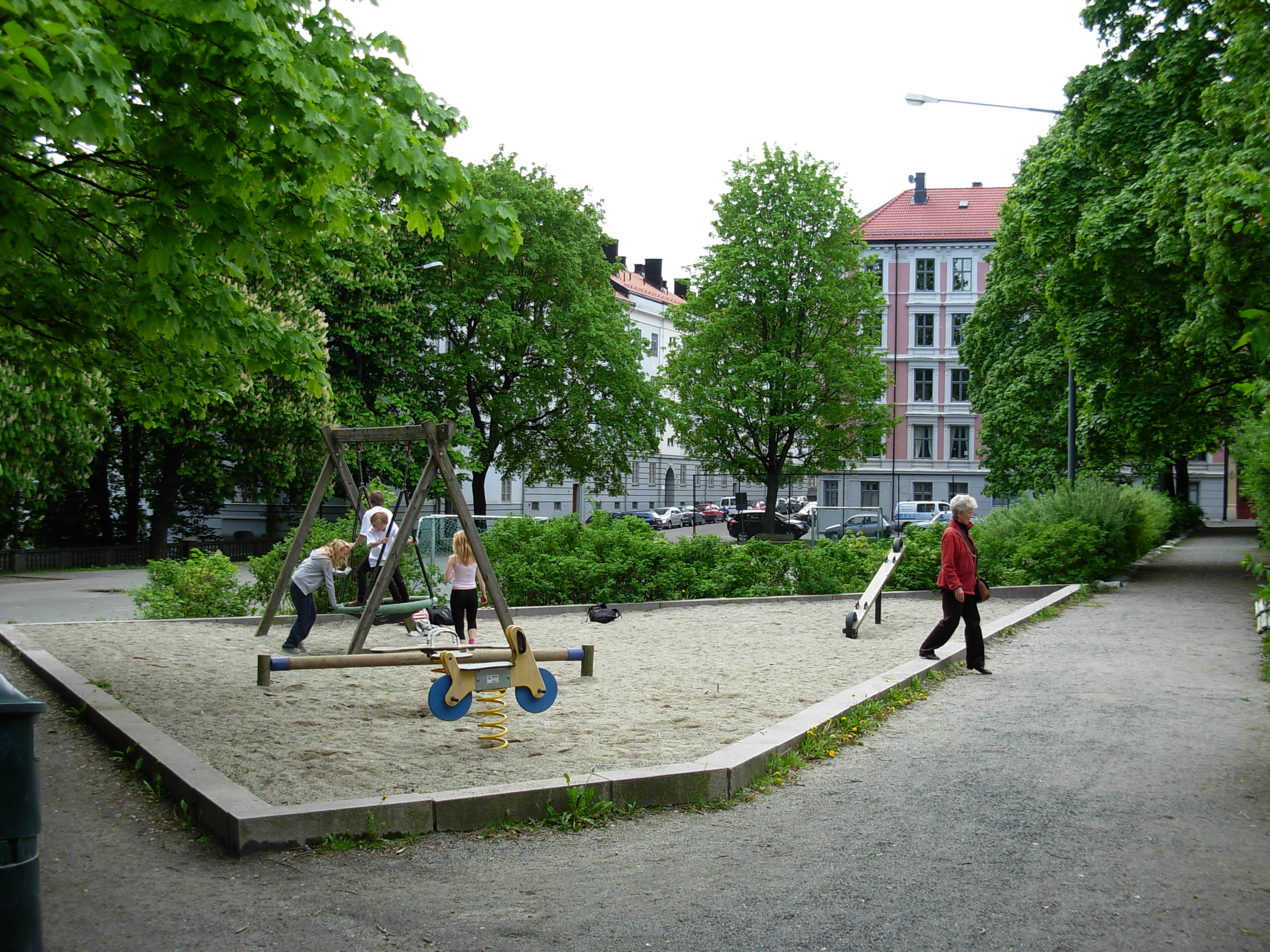 Evald Ryghs plass, Ila, Oslo